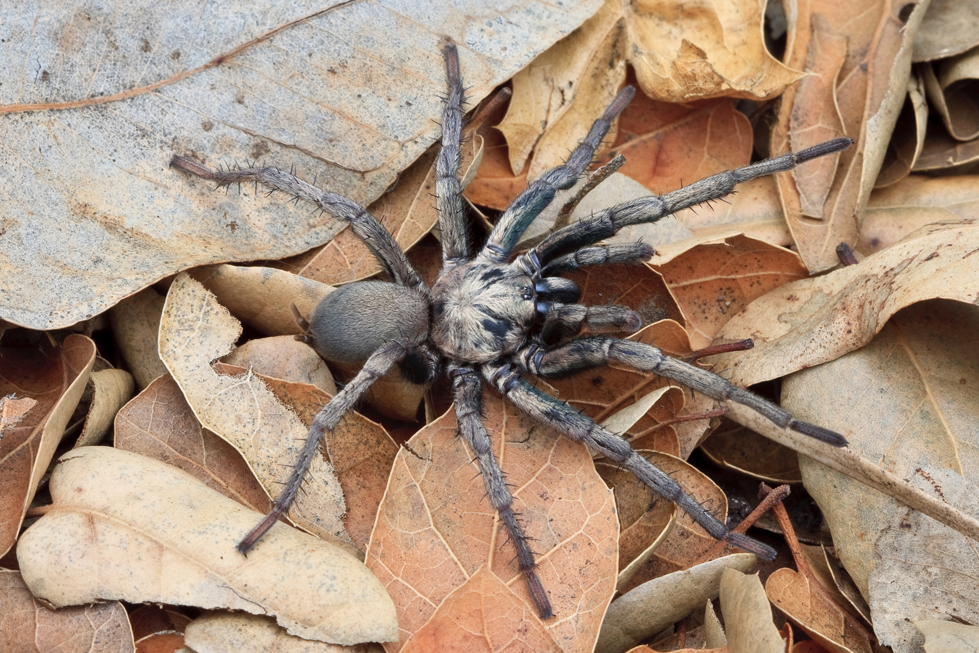 Calisoga longitarsis, adult male (F Nemesiidae)